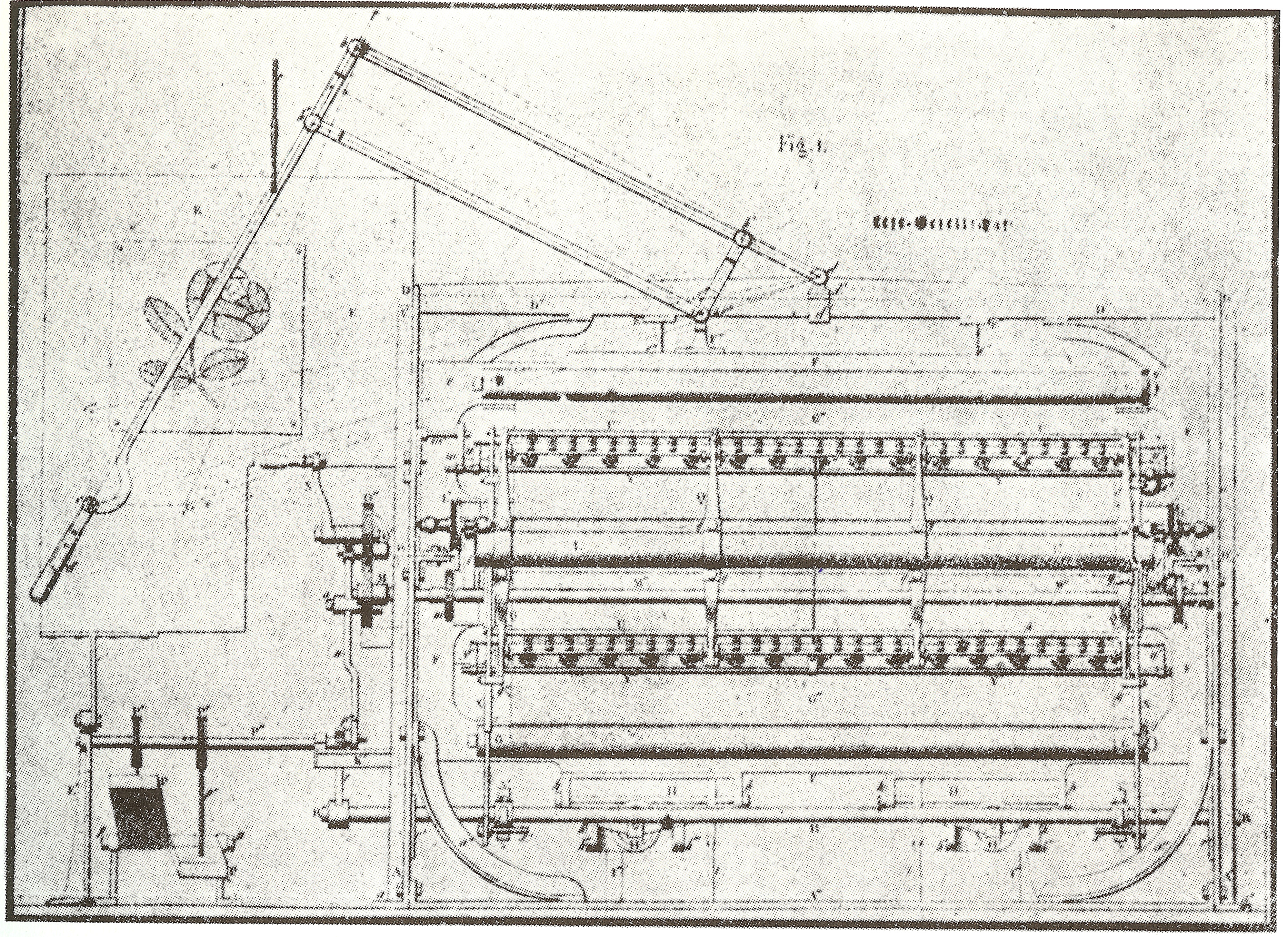 Konstruktionszeichnung der von Josua Heilmann entwickelten Handstickmaschine - Aufriss (Qualitativ noch nicht ausgereift, daher noch nicht sehr erfolgreich)